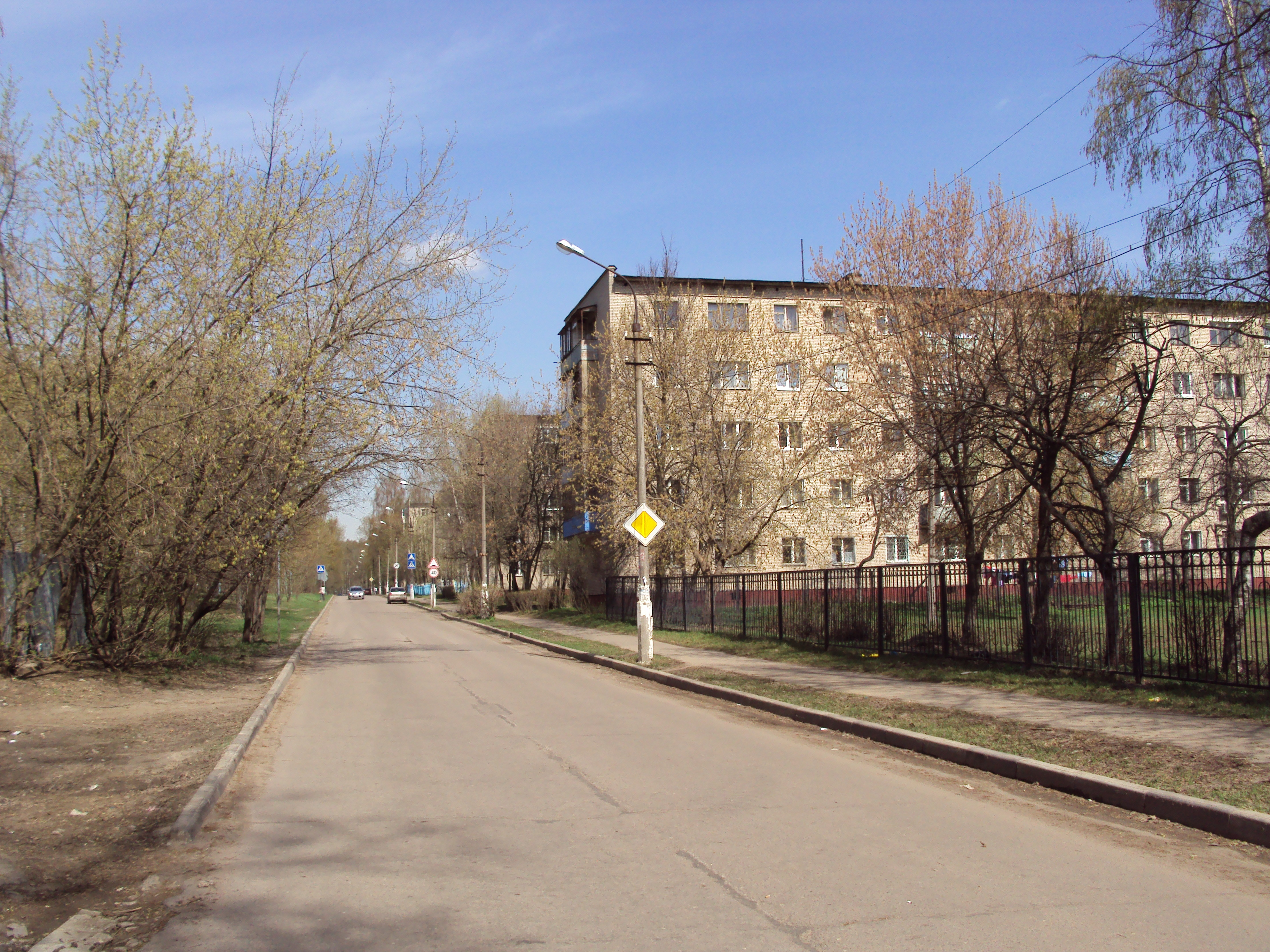 Город Балашиха. Улица Быковского.